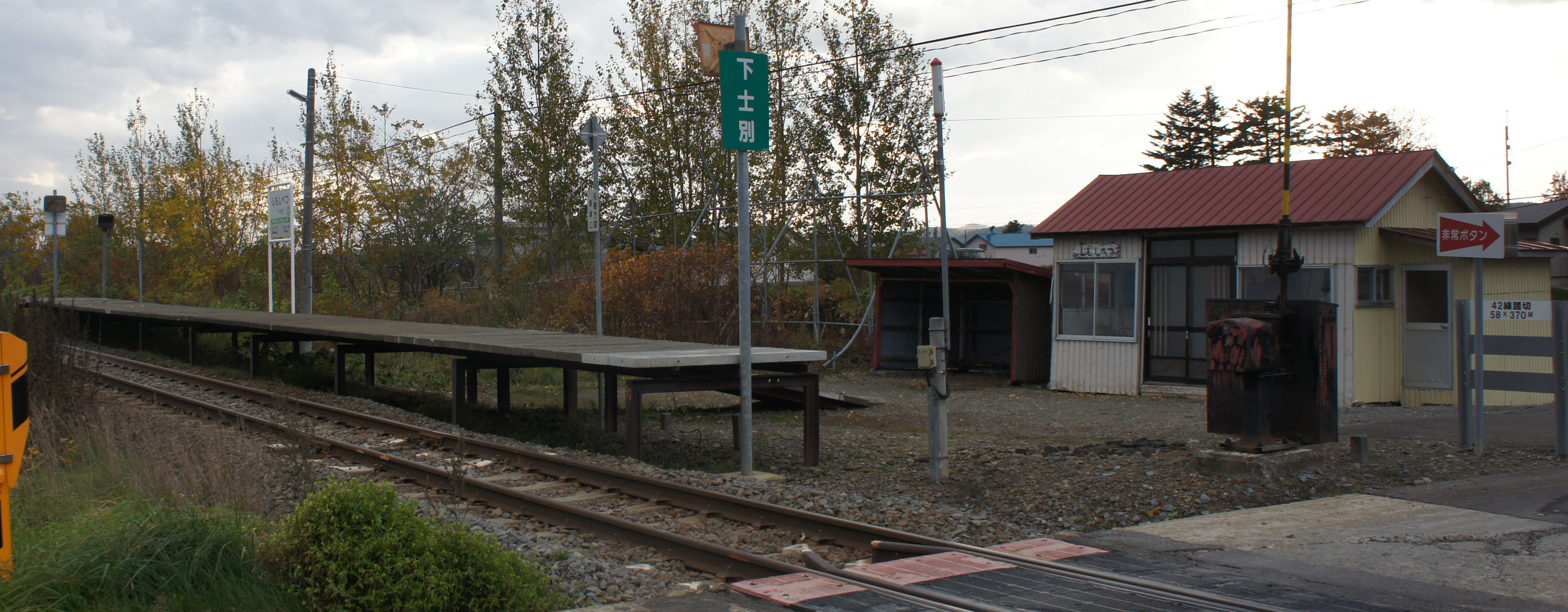 JR宗谷本線・下士別駅全景 Sony NEX-3